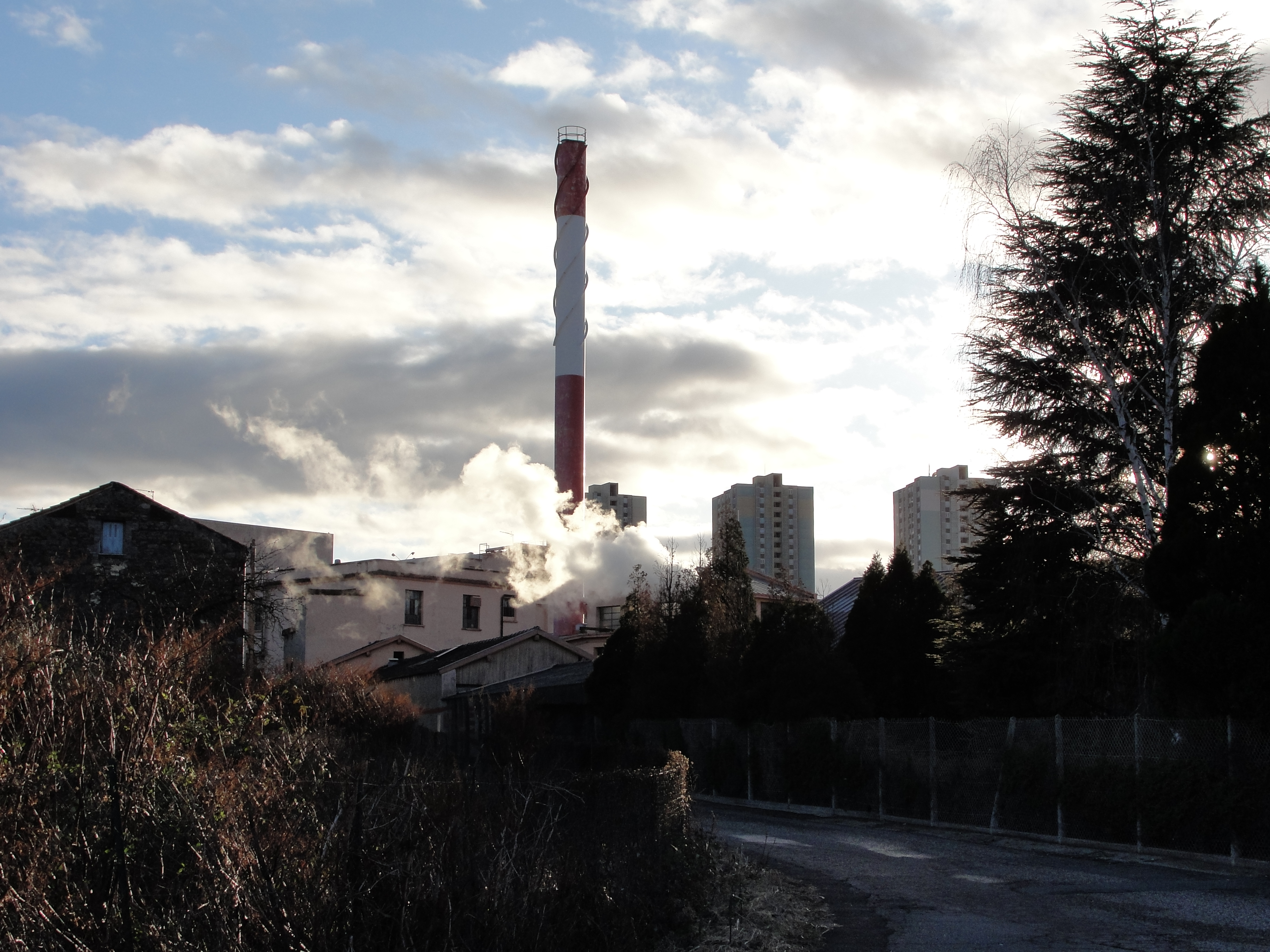 Arrière de l’usine NatraZahor à Saint-Étienne (France), hiver 2009.